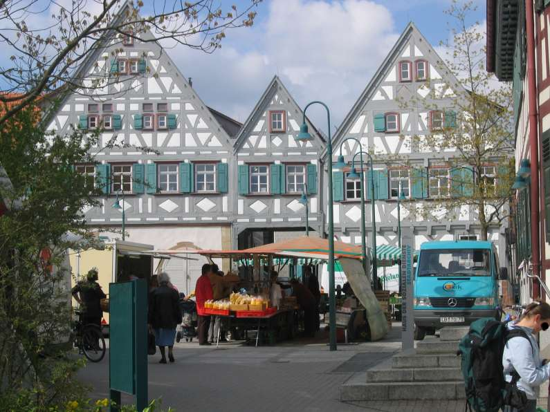 Marktplatz in Ditzingen